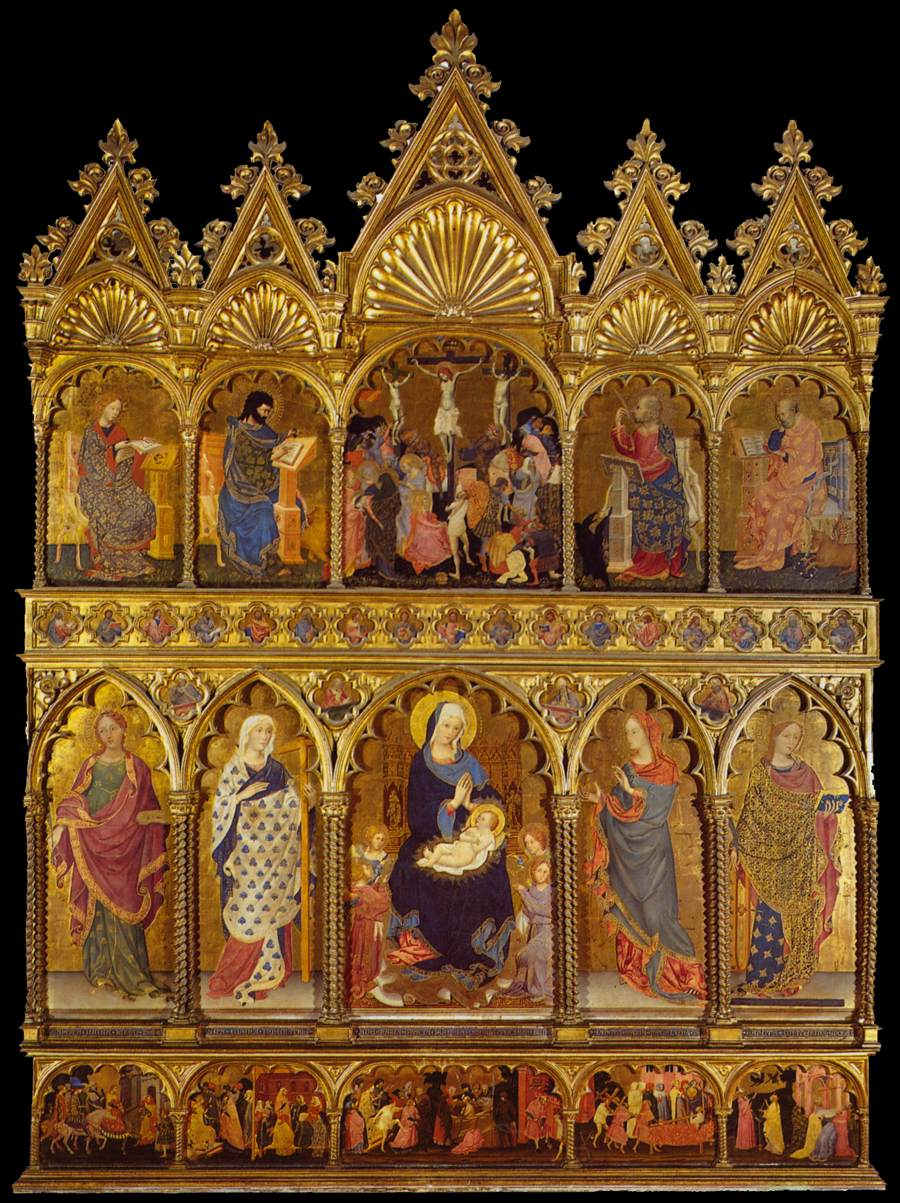 al sinistra, le sante Lucia ed Elena